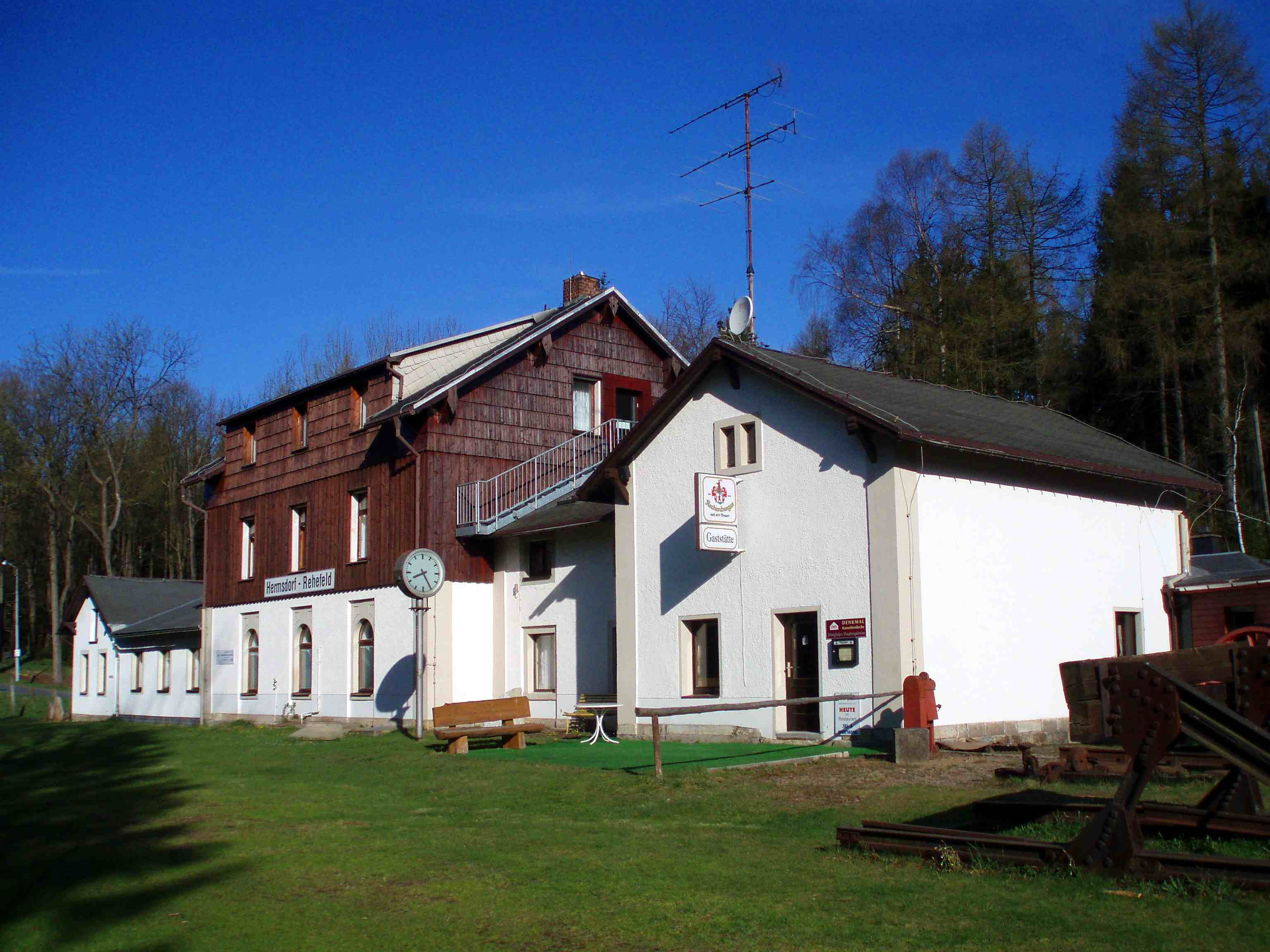 Ehemaliger Bahnhof Hermsdorf-Rehefeld